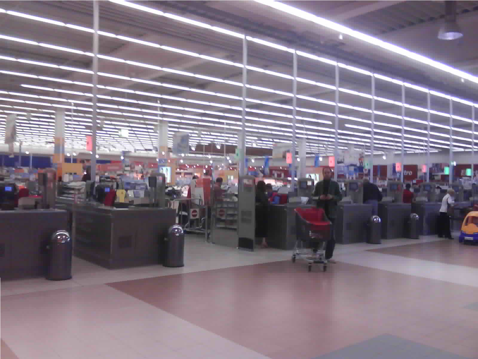 Die "normalen", neuen Kassen im Future Store